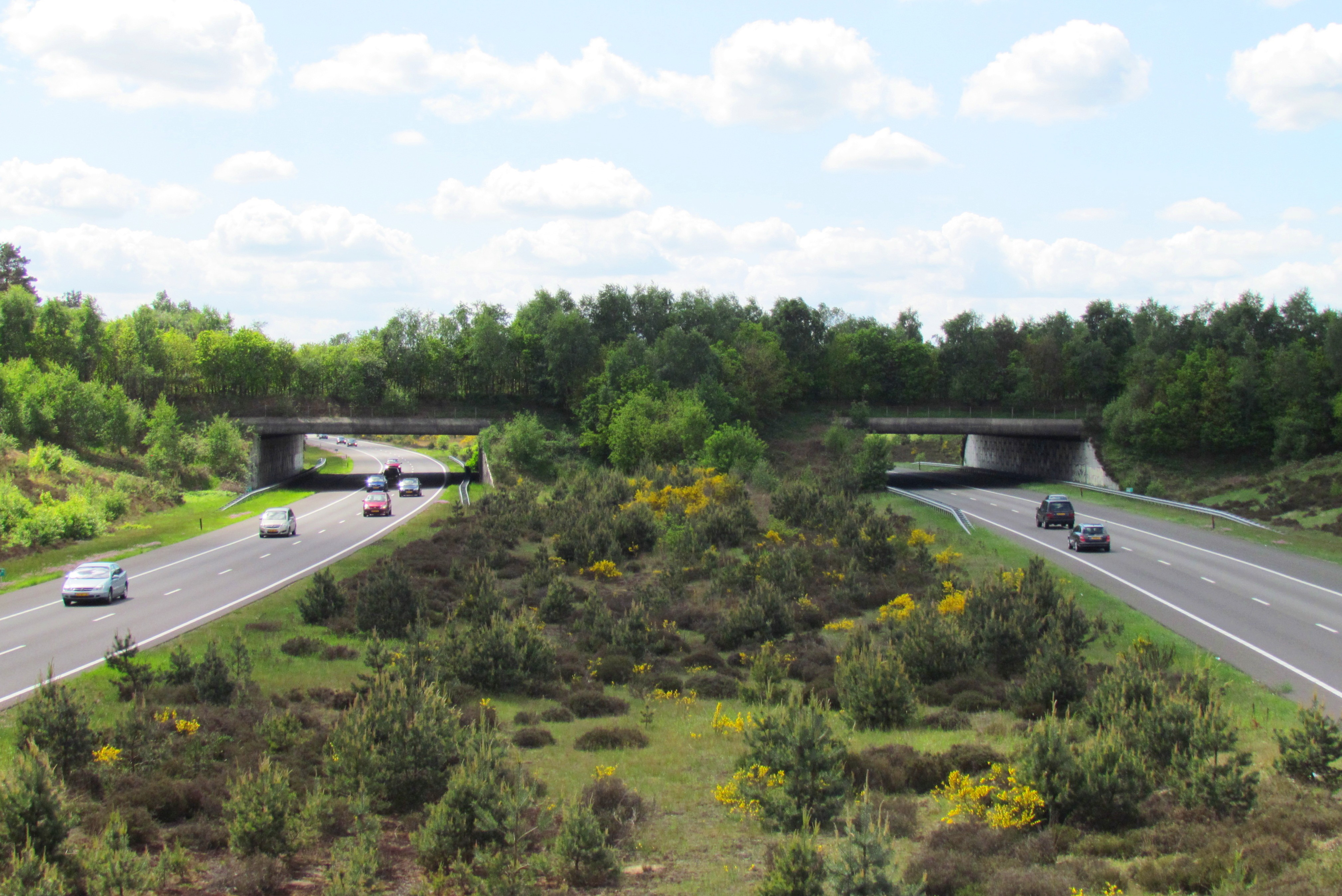 Ecoduct 'Harm van de Veen' over de Nederlandse snelweg A1 ter hoogte van het Kootwijkerveen